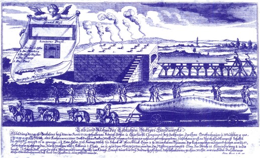 Zeithainer Riesenstollen für das Zeithainer Lustlager. Kolorierter Stich von Elias Baeck alias Heldenmuth, 27½ × 13¾ cm.